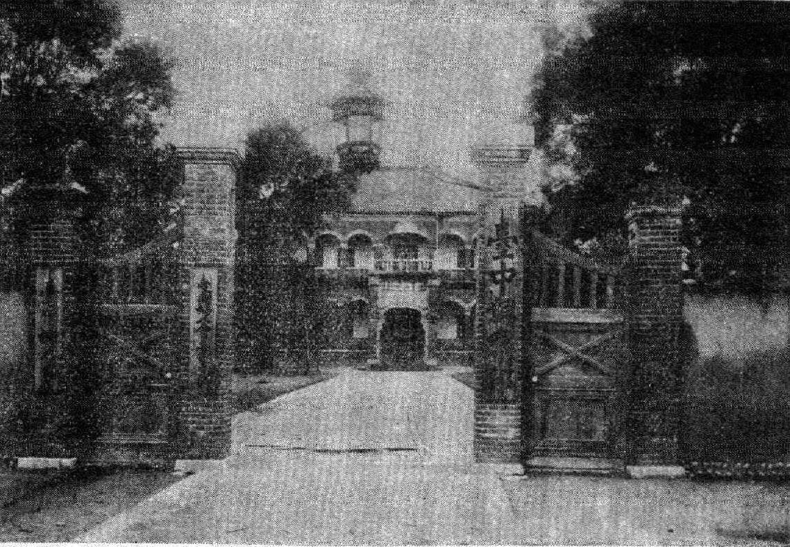 中文（台灣）: 臺中俱樂部，位於台中市大正町七丁目，建於1910年